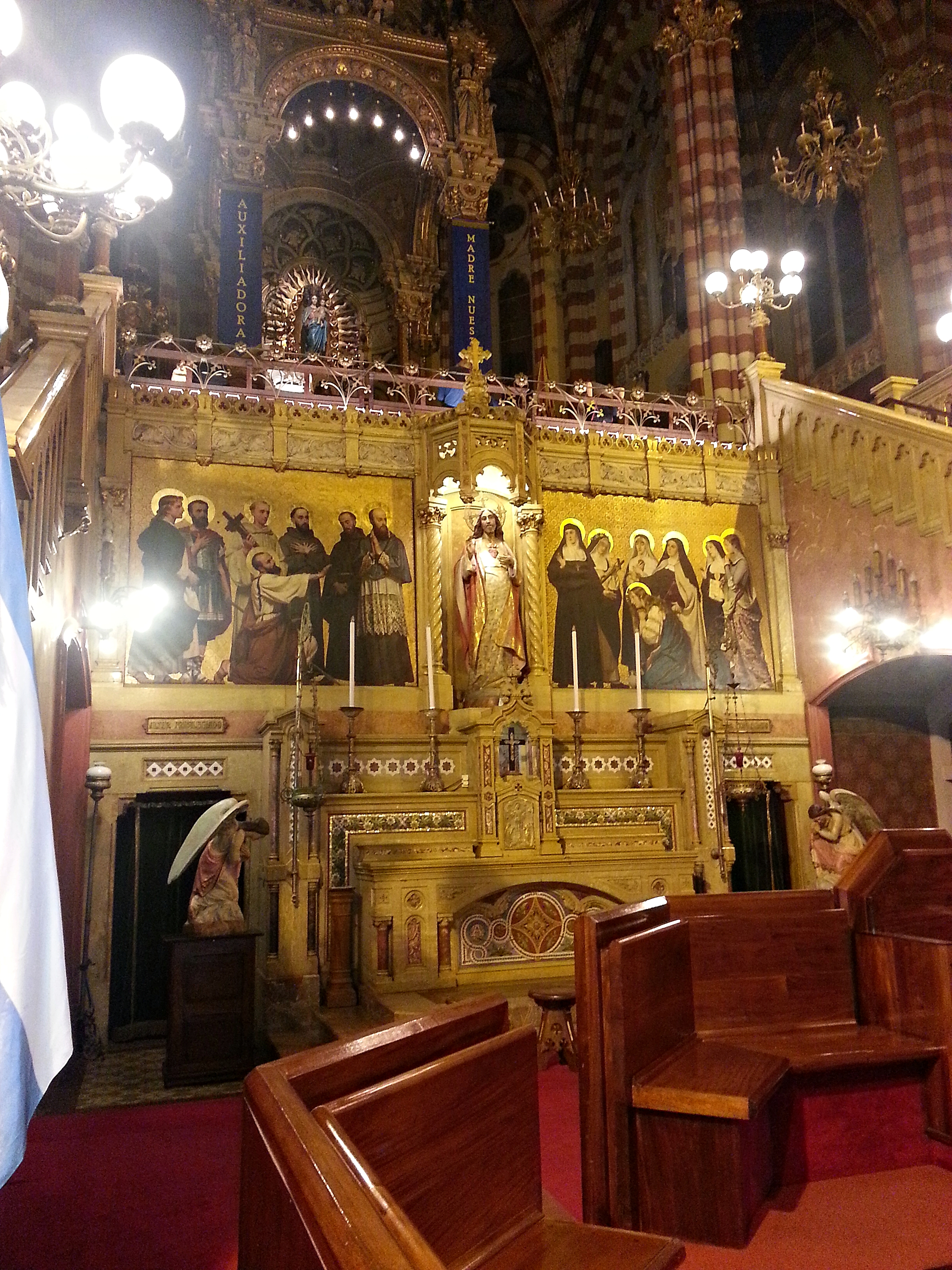 En el altar principal, la imagen central es una gran estatua del Sagrado Corazón de Jesús que se encuentra acompañada con un mural donde se disponen las figuras de santos —siete varones y siete mujeres— con las miradas enfocadas en su mayoría en la imagen principal, todos ellos vinculados de una forma y otra con la devoción al corazón de Jesucristo: son, desde la perifería hacia el centro, san Juan el Evangelista, san Longino, santo Tomás el Apóstol (arrodillado), san Bernardo de Claraval, san Francisco de Asís, san Francisco Solano y san Francisco de Sales, por una parte; y por otra, la beata Ángela de Foligno, santa Gertrudis de Helfta, santa Teresa de Jesús, santa Catalina de Siena, santa María Magdalena (arrodillada), santa Rosa de Lima y santa Margarita María Alacoque.